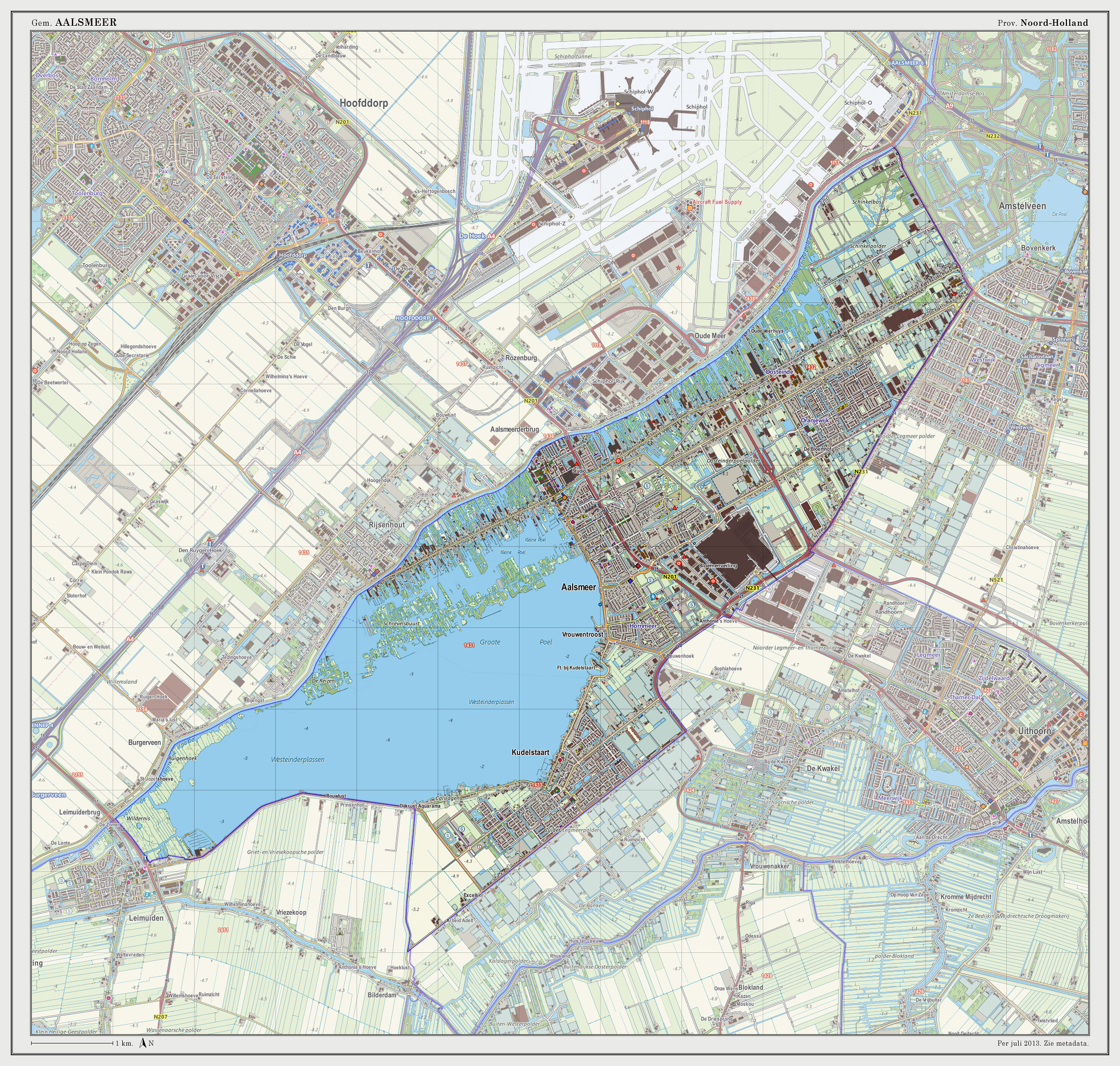 Topografische kaart van gemeente Aalsmeer (2013). Samengesteld door user:janwillemvanaalst op basis van de GML open geodata van de BRT/Top10NL (basisregistratie Topografie, Kadaster 2011), vrijgegeven door Kadaster onder de Creative Commons BY licentie. Additionele gegevens uit BAG (8 juli 2013), uit de Open Street Map (9 juli 2013) en uit de Risicokaart. Peildatum kaartbeeld: 9 juli 2013. Samenstelling en kleurenschema: Jan-Willem van Aalst, met QuantumGIS en Photoshop. Zie ook de Legenda.